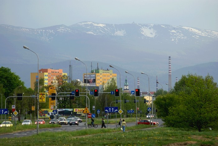 Zabobrze z Karkonoszami w tle. Autor zdjęcia: Michał Rażniewski.